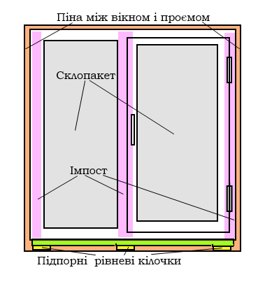 Схематичне зображення віконної конструкції для ілюстрування поняття Імпост